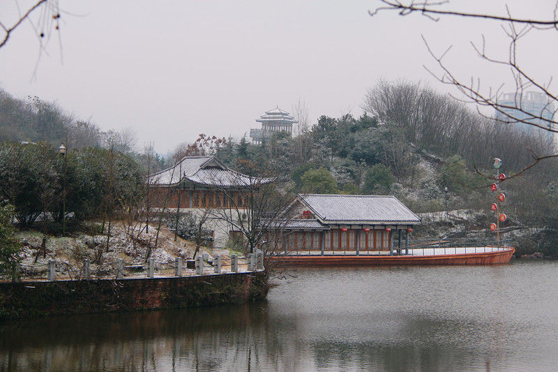 冬季拍平湖公园